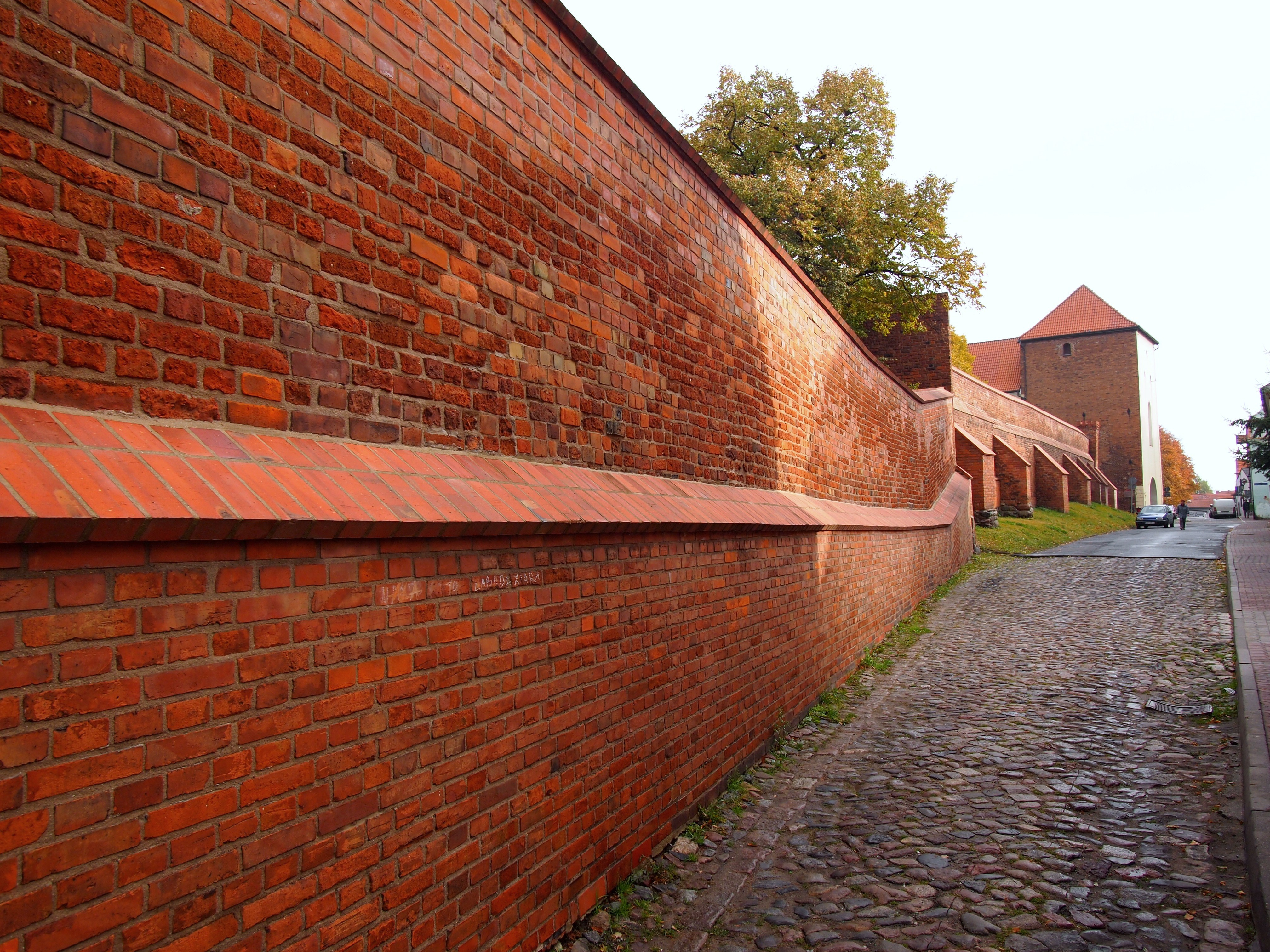 Chełmno.